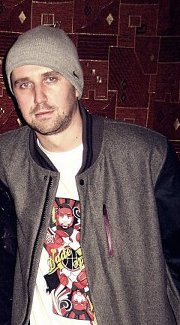 delik ?